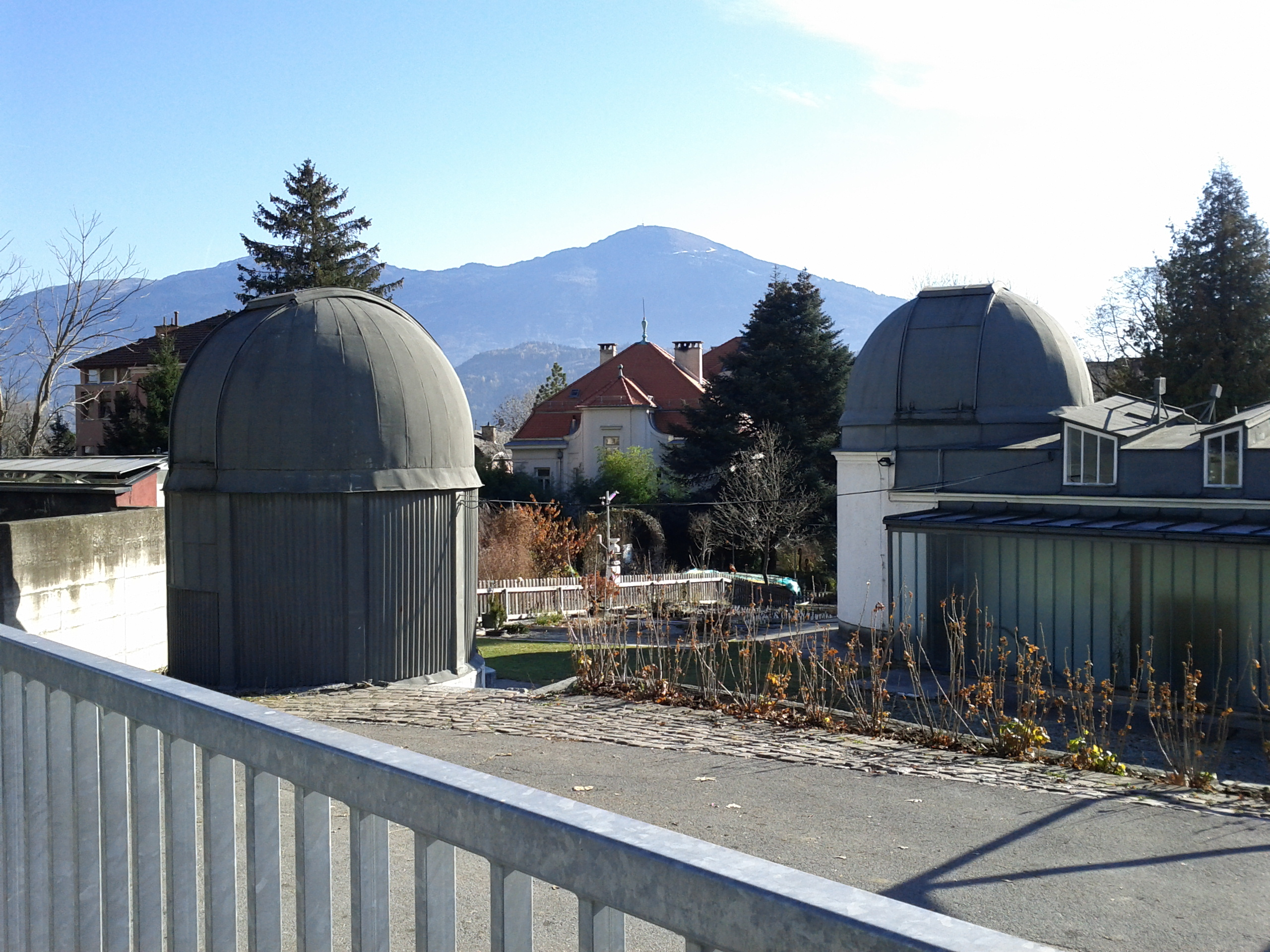 Oppolzersche Sternwarte - Sternwartestraße 15, Hötting